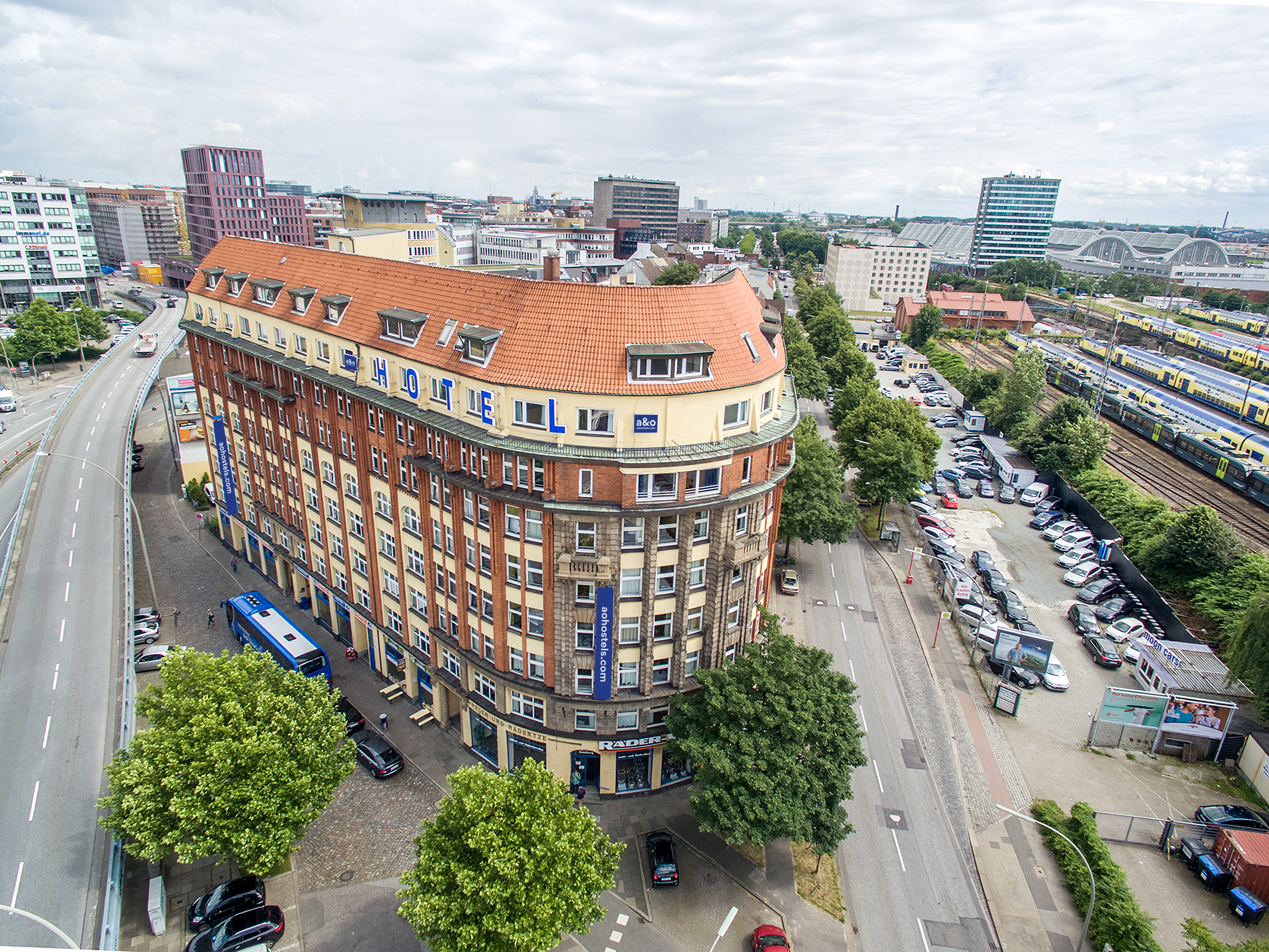 AO Hamburg HBF Building